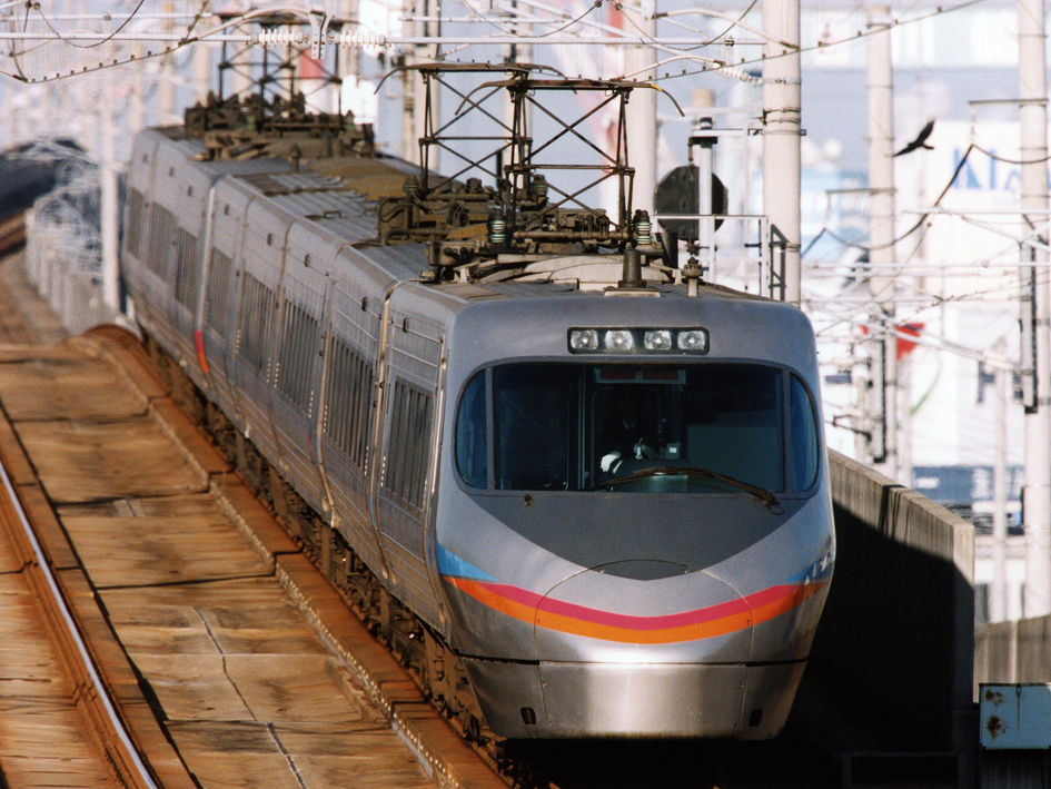 JR四国 8000系特急形電車 特急「しおかぜ」